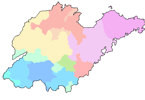 中文（中国大陆）: 依照《中国语言地图集》制作的山东方言地图 胶辽官话登连片 胶辽官话青州片 冀鲁官话（受胶辽官话影响） 冀鲁官话章利片 冀鲁官话 冀鲁官话（受中原官话影响） 中原官话（受冀鲁官话影响） 中原官话洛徐片 中原官话郑曹片 中原官话蔡鲁片